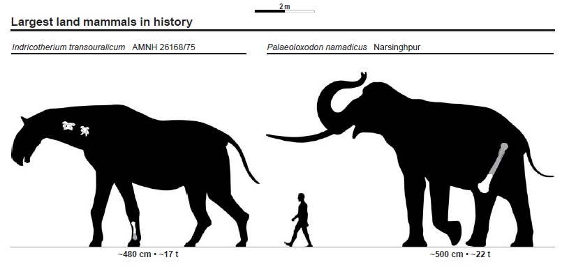 Largest land mammals in history. Indricotherium transouralicum and Elephas namadicus size chart.